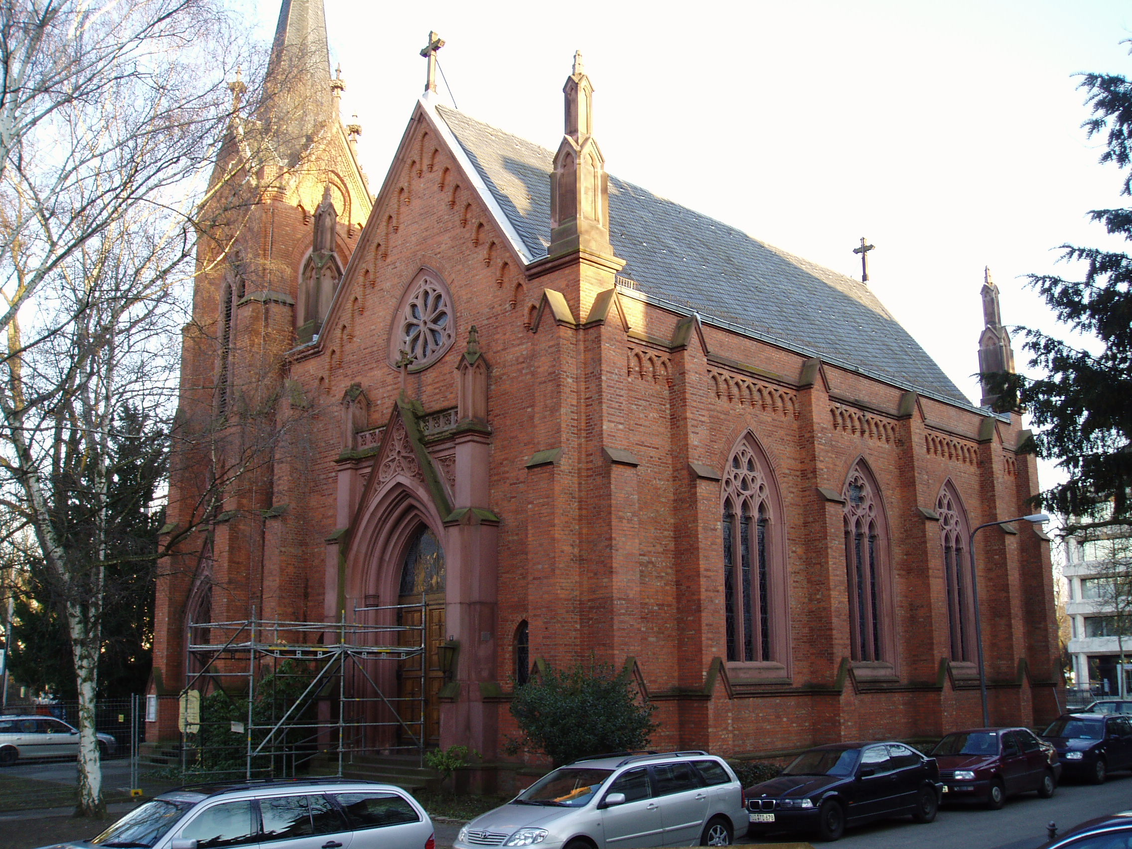 Das Bild zeigt die Englische Kirche an der Frankfurter Straße in Wiesbaden. Aufgenommen ist das Bild vom Eingang der angrenzenden Villa Clementine aus. Quelle: selbst fotografiert von Querido am 23.03.2006 Querido Datum: 25.03.2006